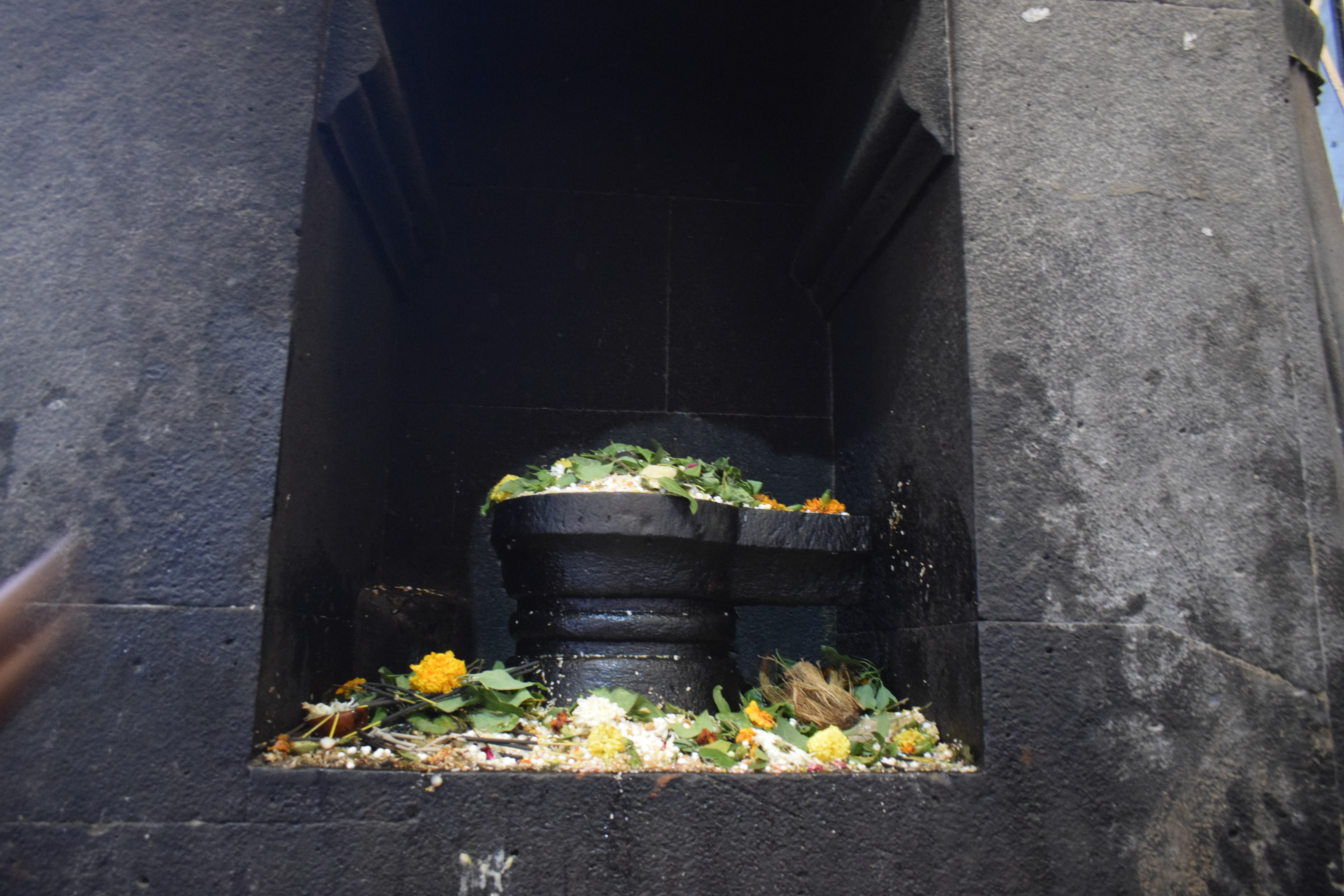 श्री शिखरेश्वर लिंग